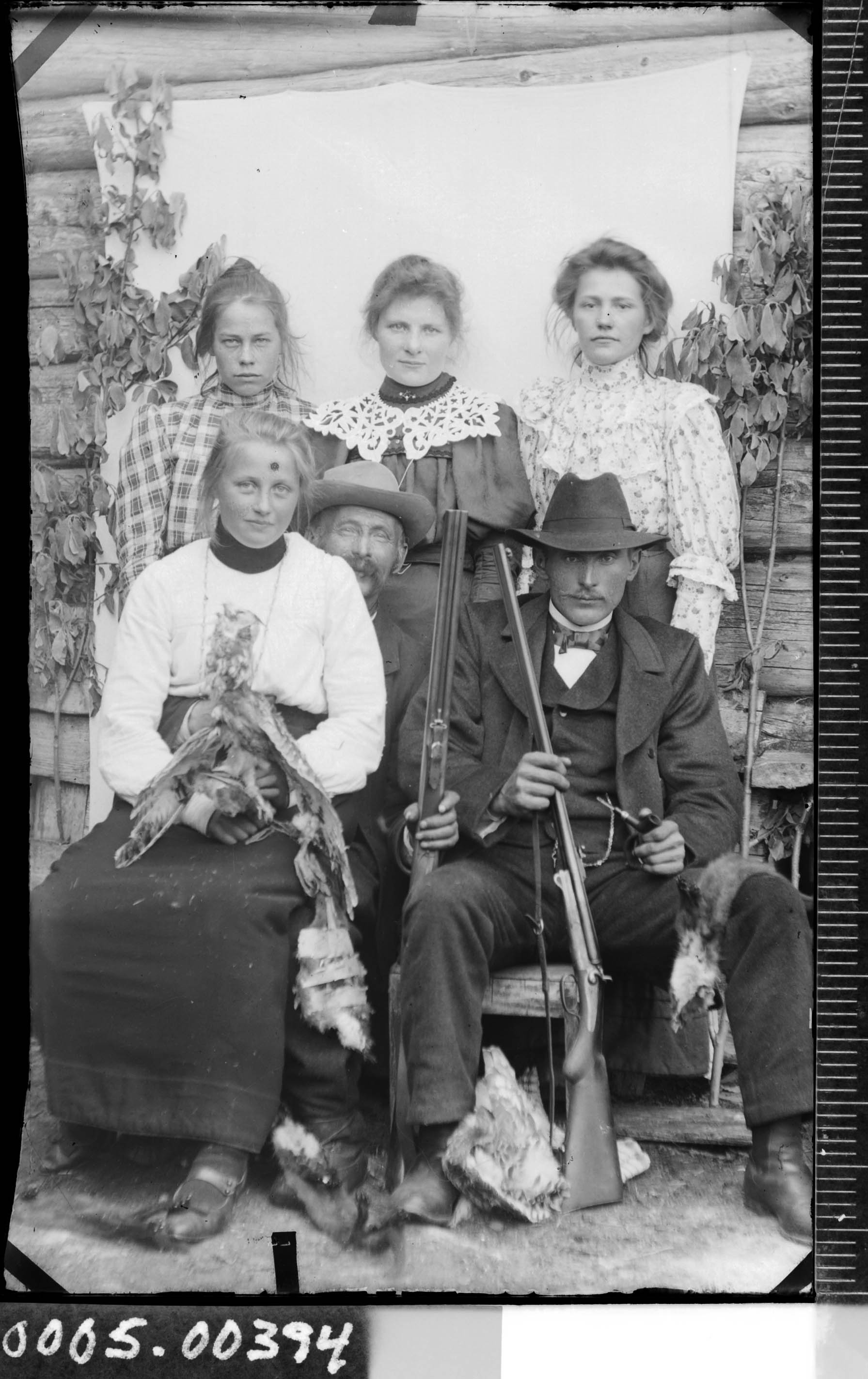 Gruppebilde av fire kvinner og to menn med geværer og trofeer fra jakta. Depicted people: Brenna, Anna Brita Mortensdotter, Gudding, Karen Julie Karlsdatter, Mikkelsen, Arnt and Nyvik, Anna Kristine Andersdatter